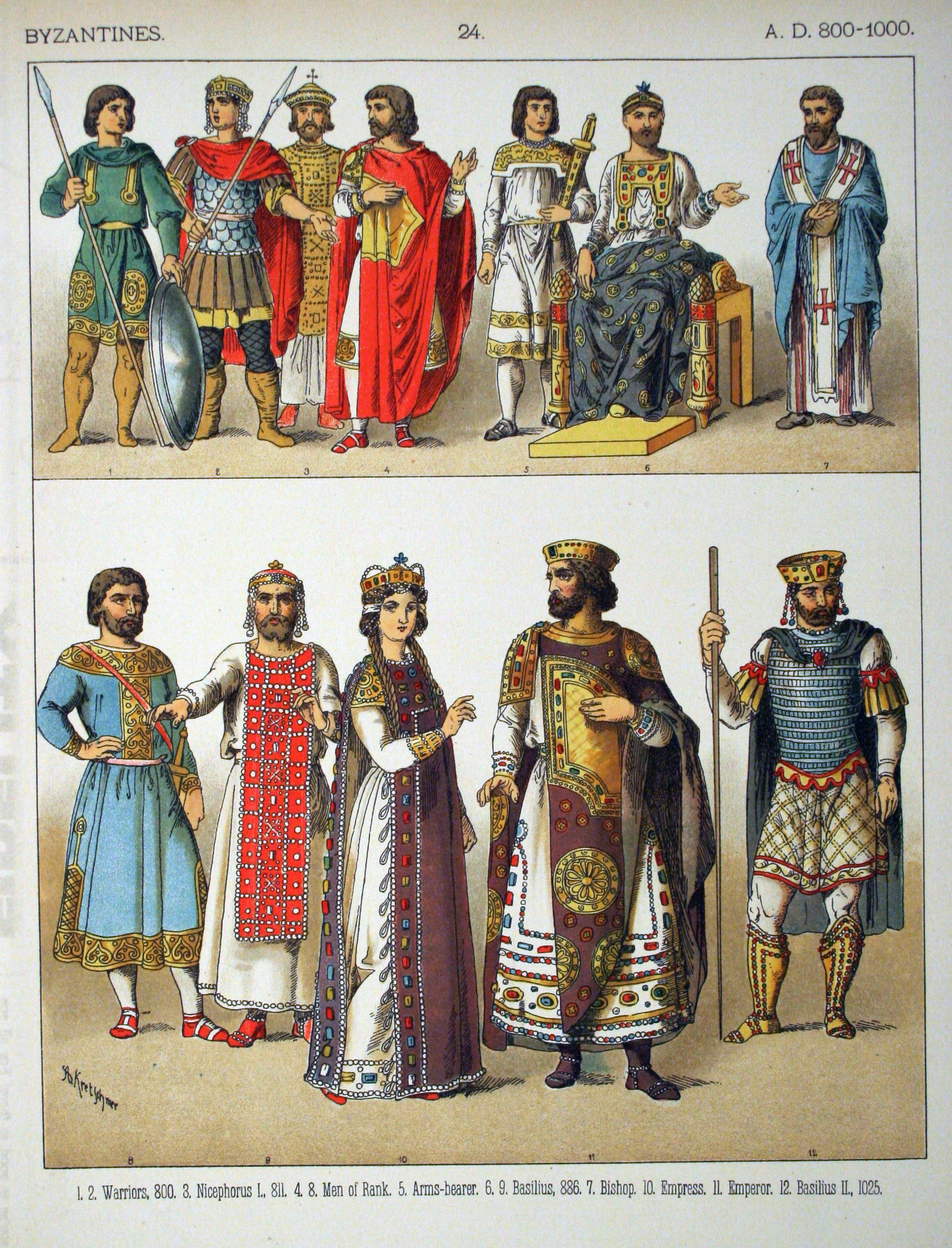 A.D. 800-1000 Byzantines